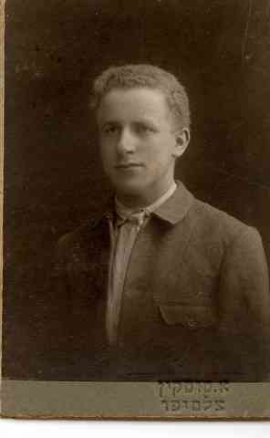 ברוך בן יהודה, חבר מהגימנסיה Baruch Ben Yehuda, a friend from the Gymnasium ברוך בן יהודה תל אביב 04 גימנסיה הרצליה 4